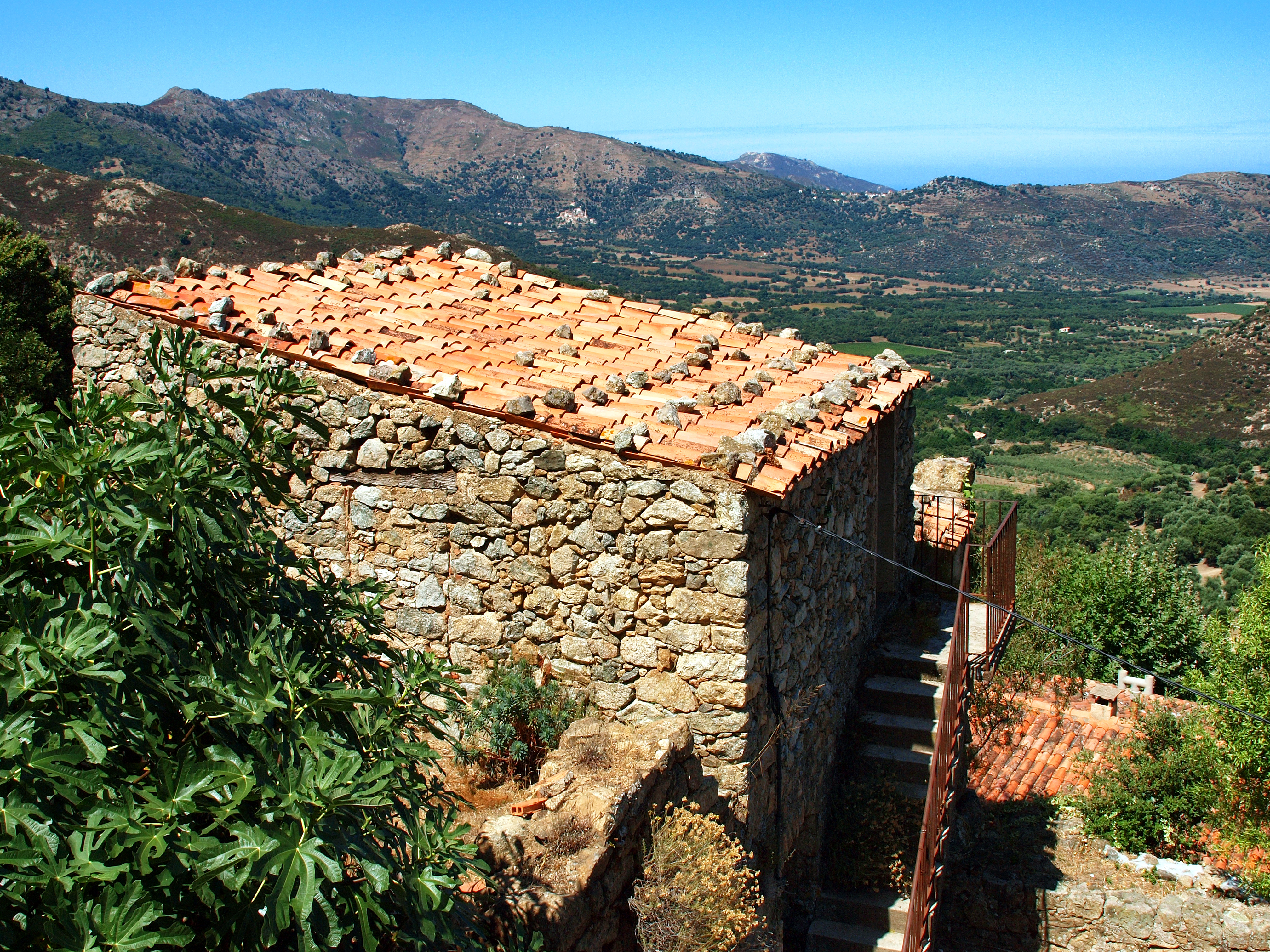 Nessa, Balagne (Corse) - Les villages d'Avapessa et de Cateri, et la haute vallée du Regino vus depuis Nessa